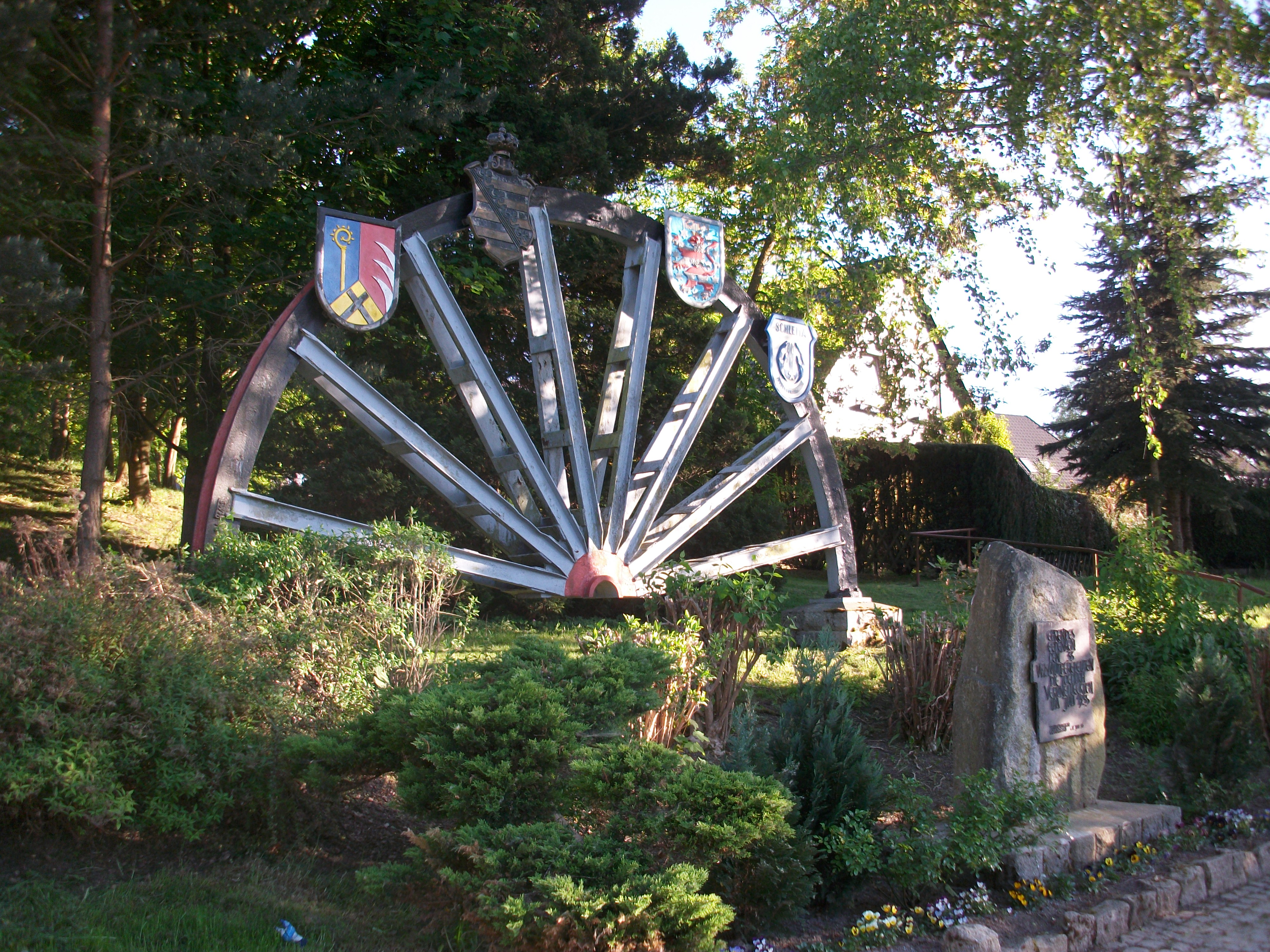 Niederschlema, Gedenkstätte Bergunglück 1955